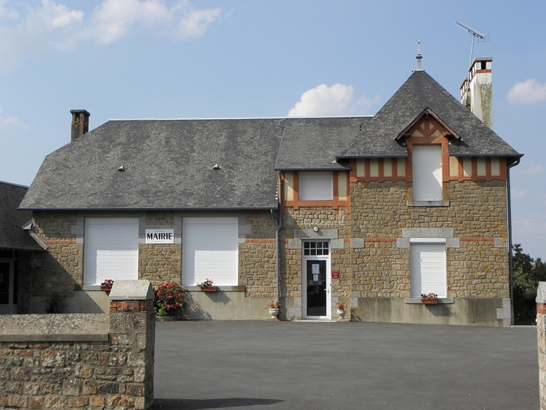 Mairie de Précey (50).